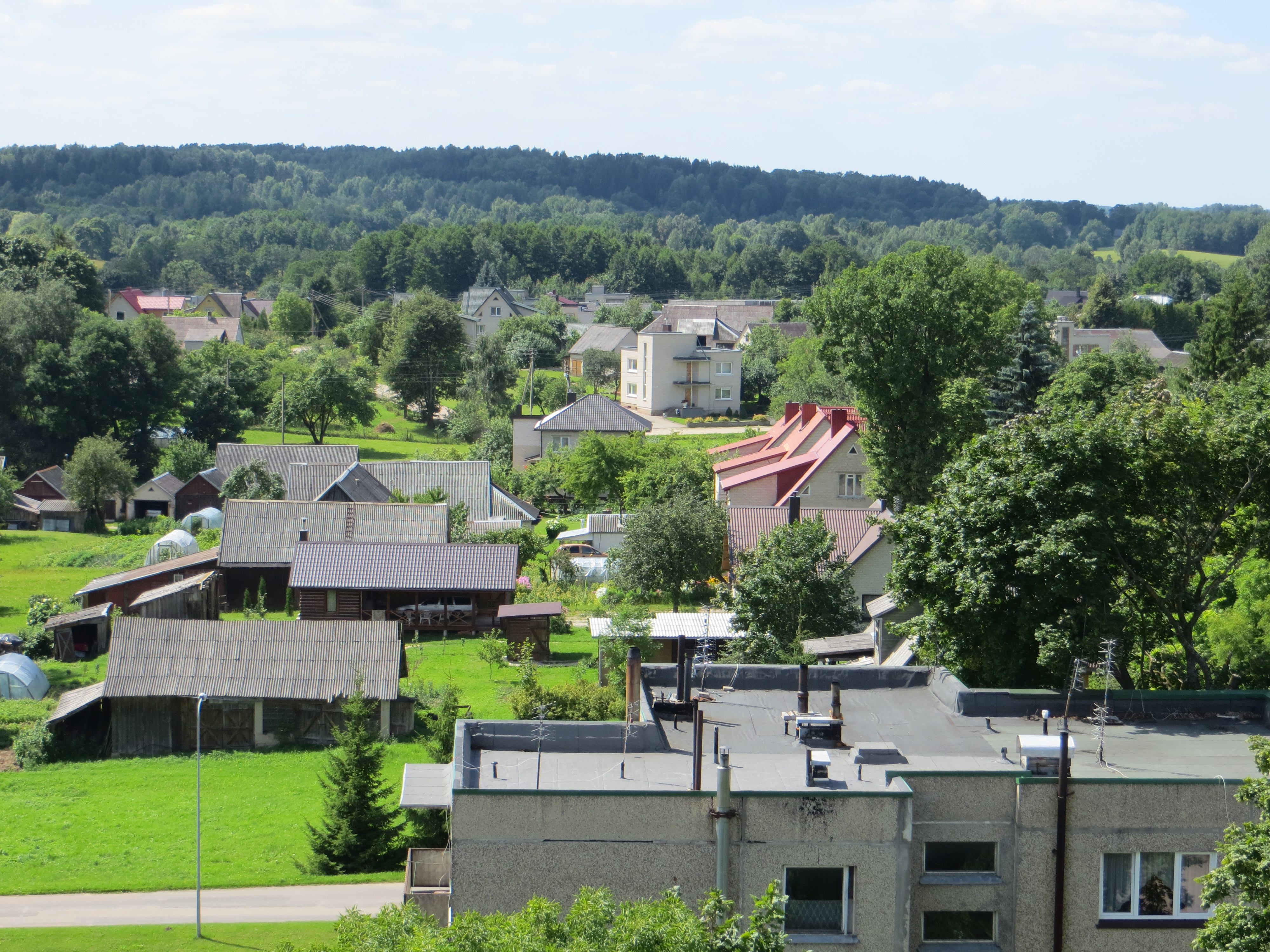 Antalgė, Lithuania